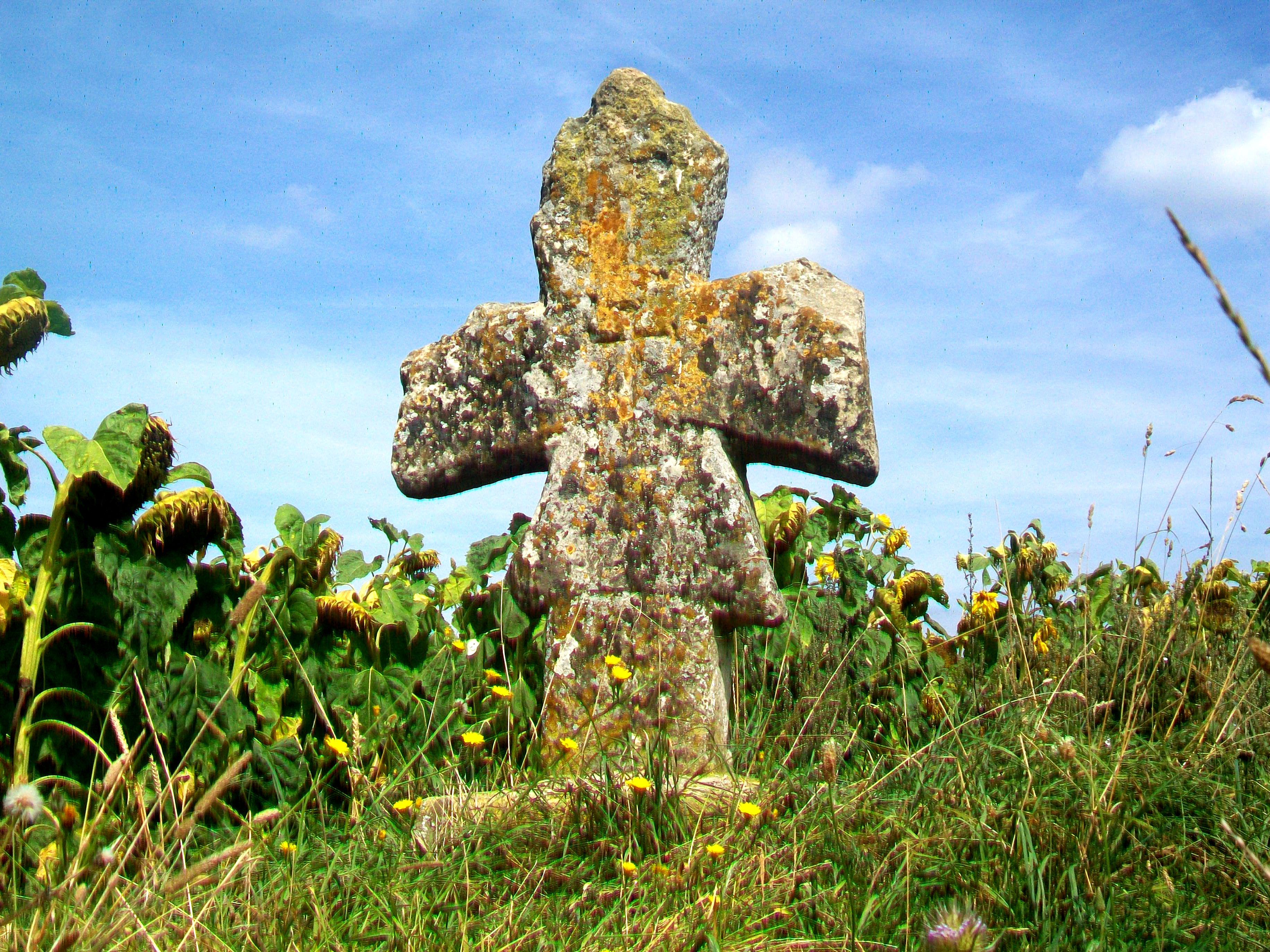 La croix des Friches, croix pattée emblématiqe du Vexin.